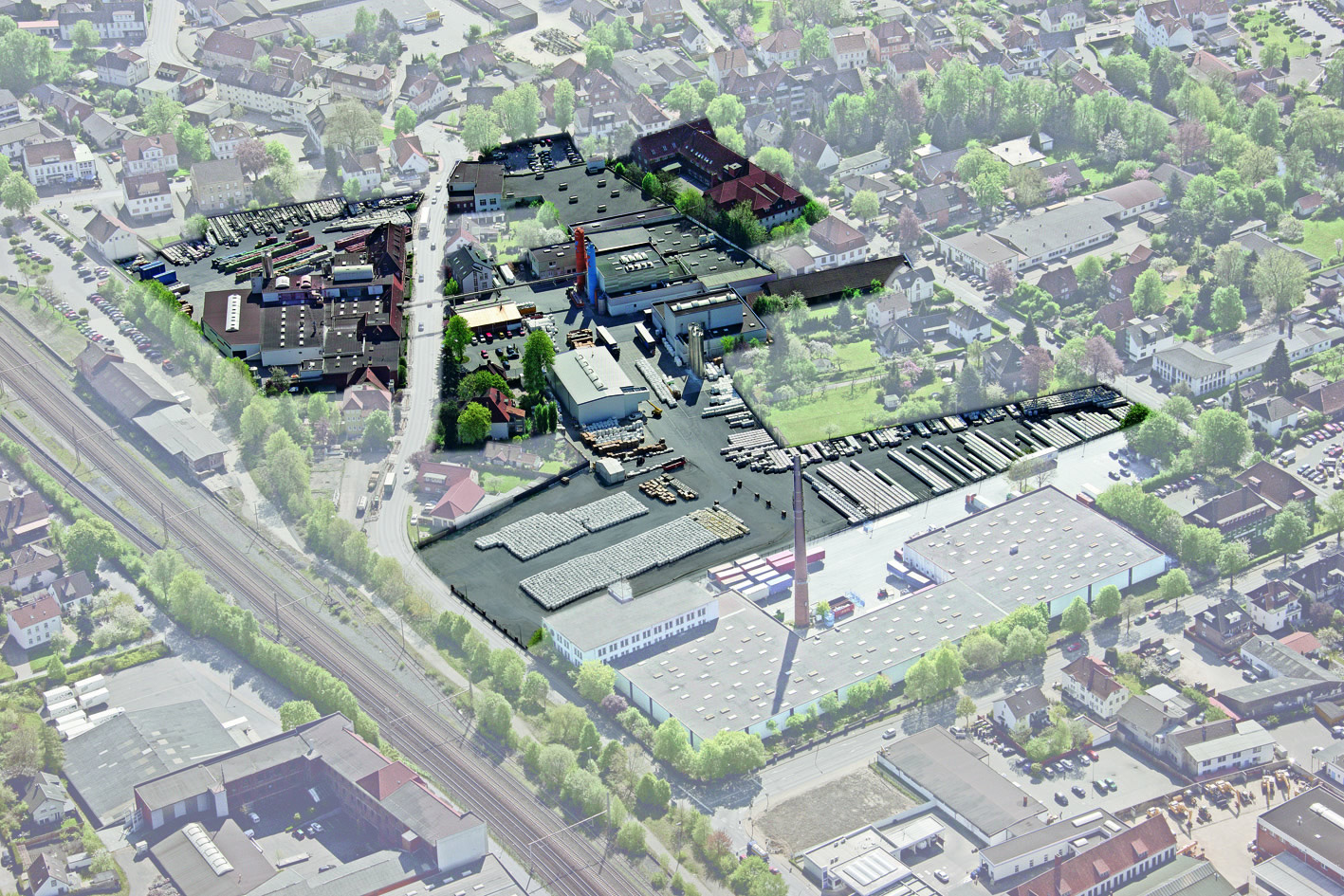 Luftaufnahme Melos Gelände